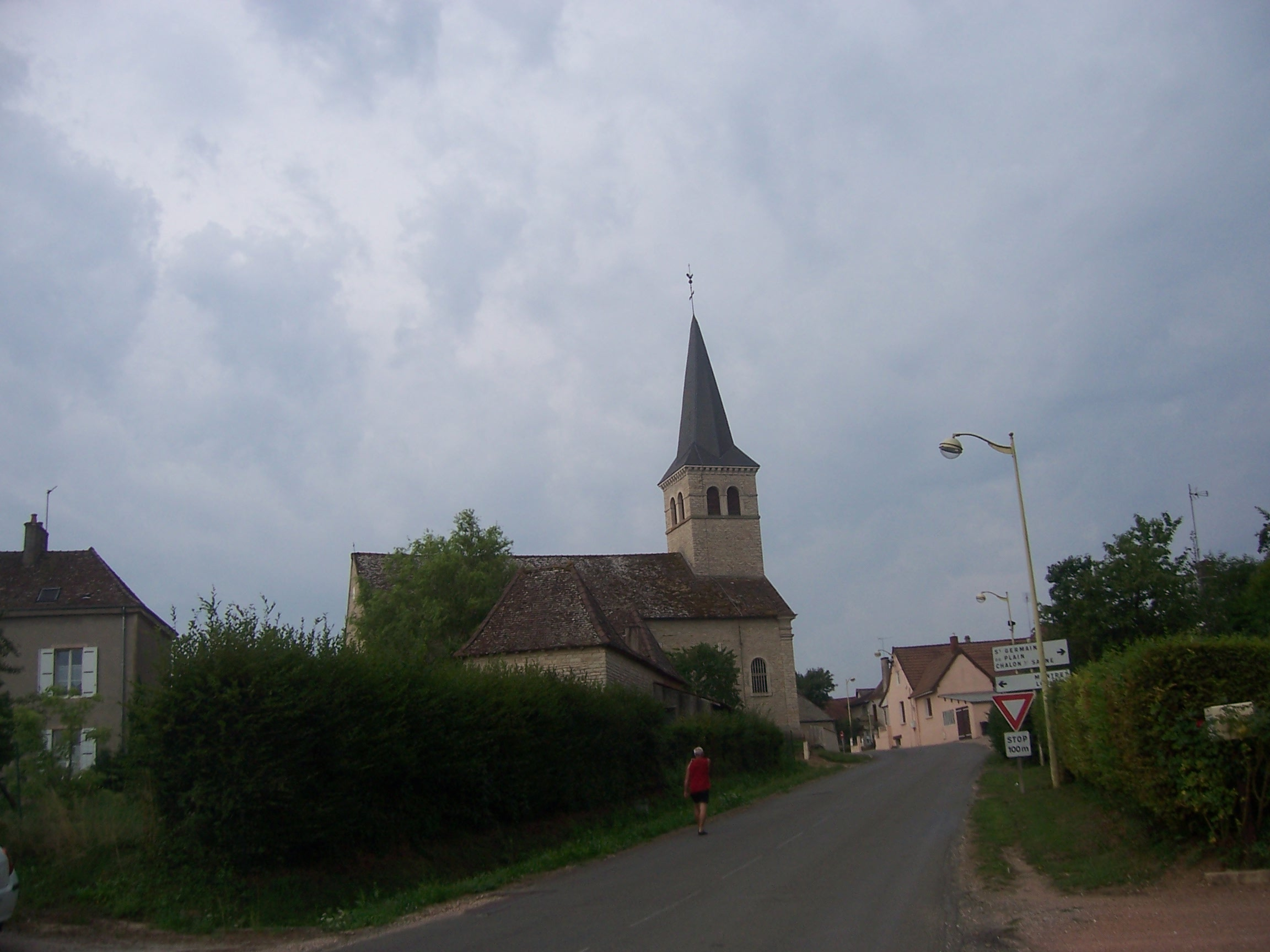 Eglise de Saint-Etienne-en-Bresse